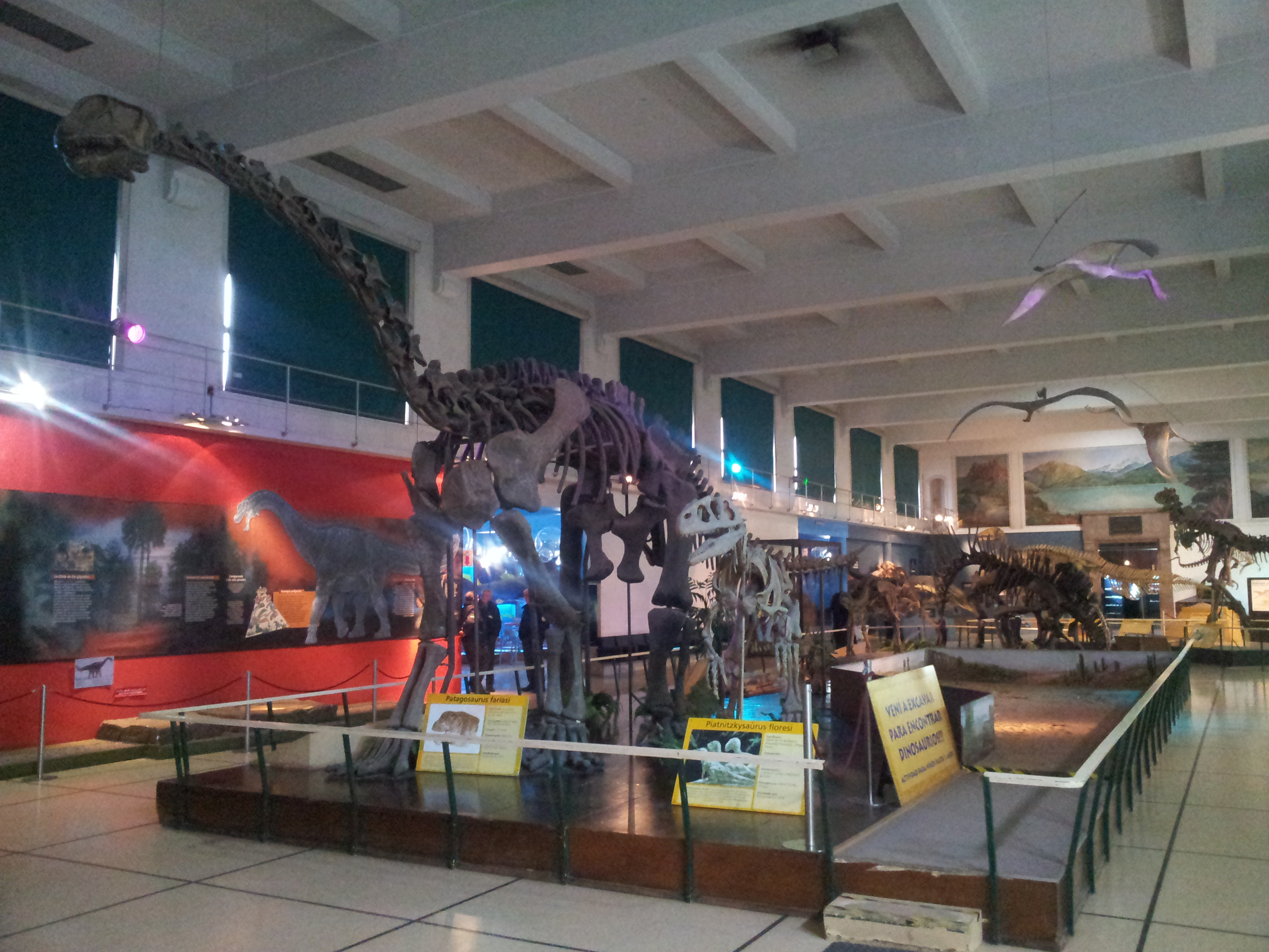 Museo de ciencias naturales